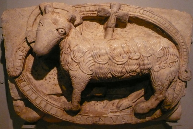 Agnus Dei. Clau d'arquivolta del taller del mestre de Cabestany procedent del monestir de Sant Pere de Rodes. Actualment al museu Marès de Barcelona.